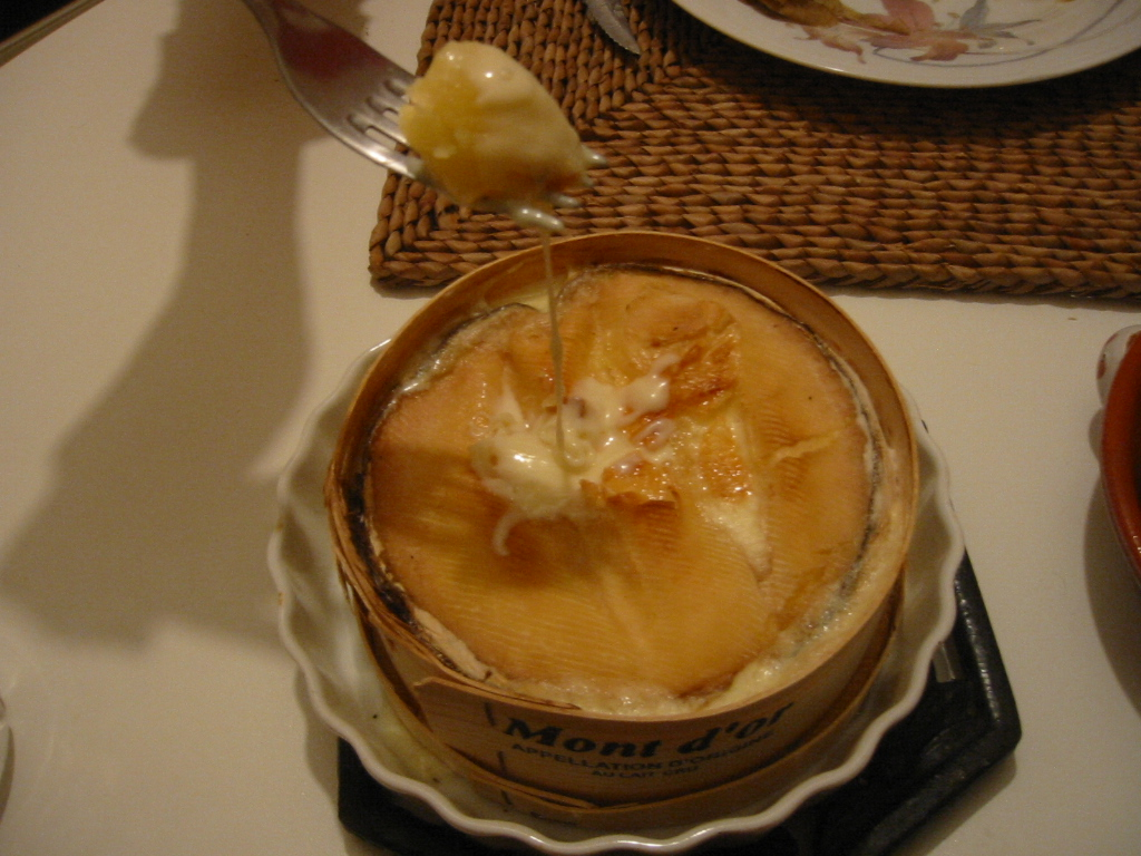 Mont d'or chaud + pomme de terre